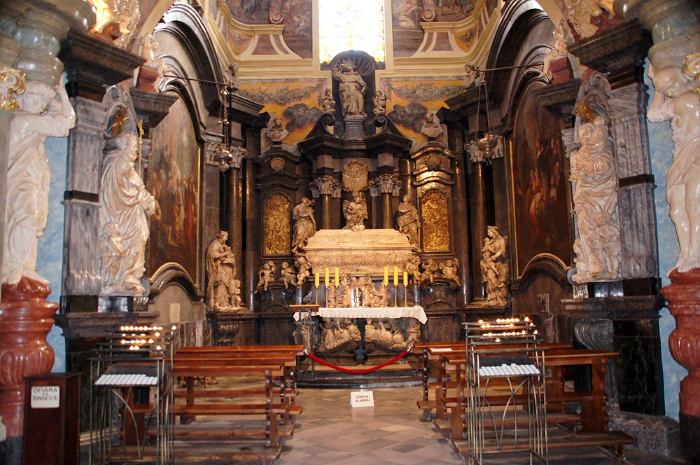 Wrocław Stare Miasto, pl. Dominikański 2 - dawny kościół klasztorny oo. Dominikanów, obecnie Kościół św. Wojciecha (zabytek nr 239/165)